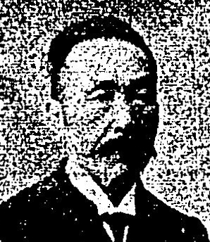 西村左門編『靜岡縣人肖像錄』柴、1907年。